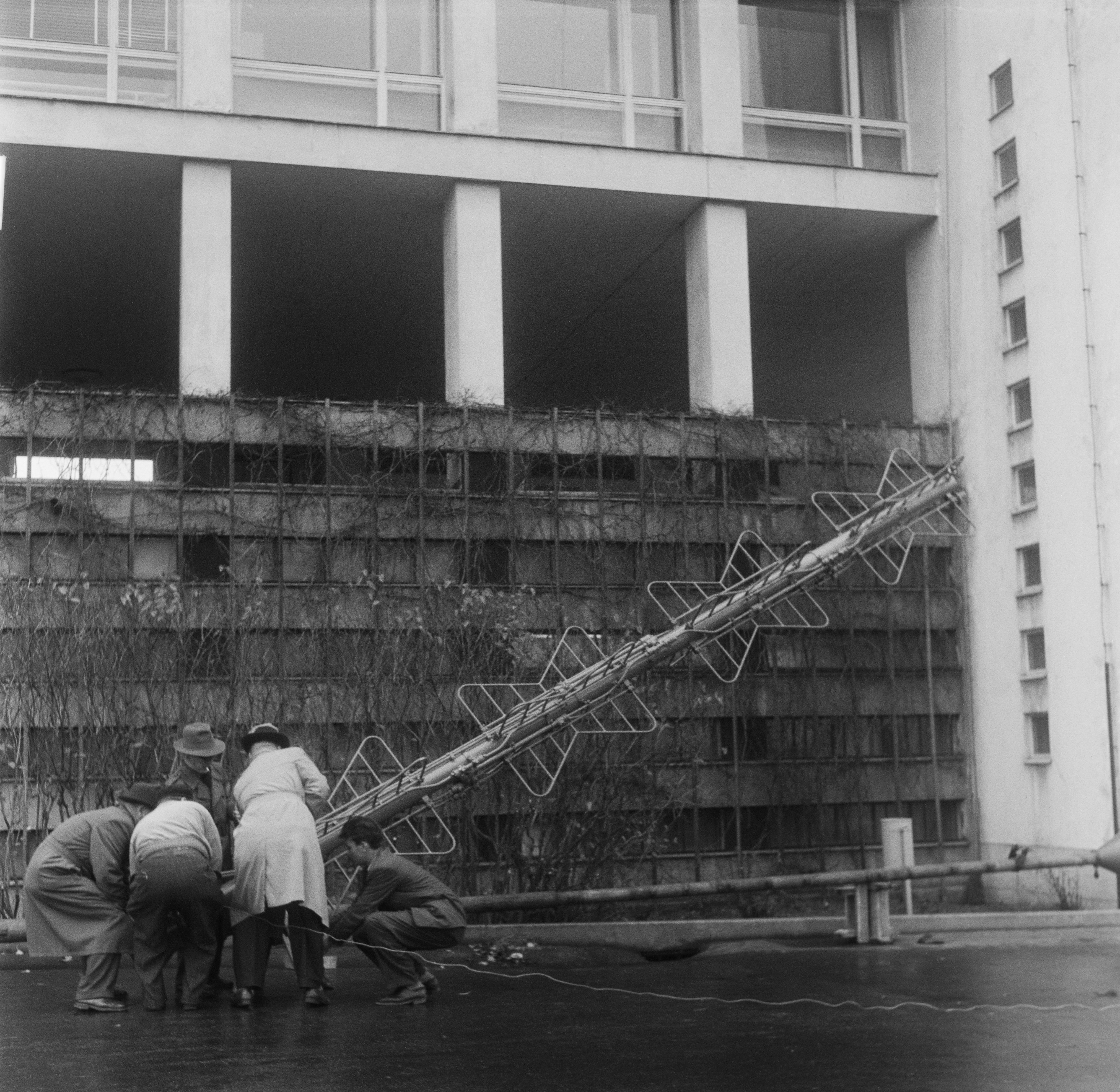 Yleisradion televisioantenni (perhosantenni) siirretään Stadionin torniin Helsingissä. Tiedätkö jotain tästä kuvasta? Jätä kommentti tai ota yhteyttä sähköpostitse: Tutustu Ylen arkistosisältöihin: Fler skatter från Yles arkiv: More about Yle, the Finnish Broadcasting Company